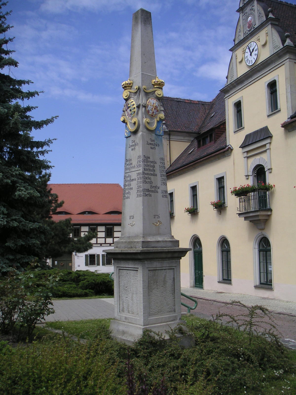 Nachbildung der kursächsische Distanzsäule von 1726 in Lommatzsch